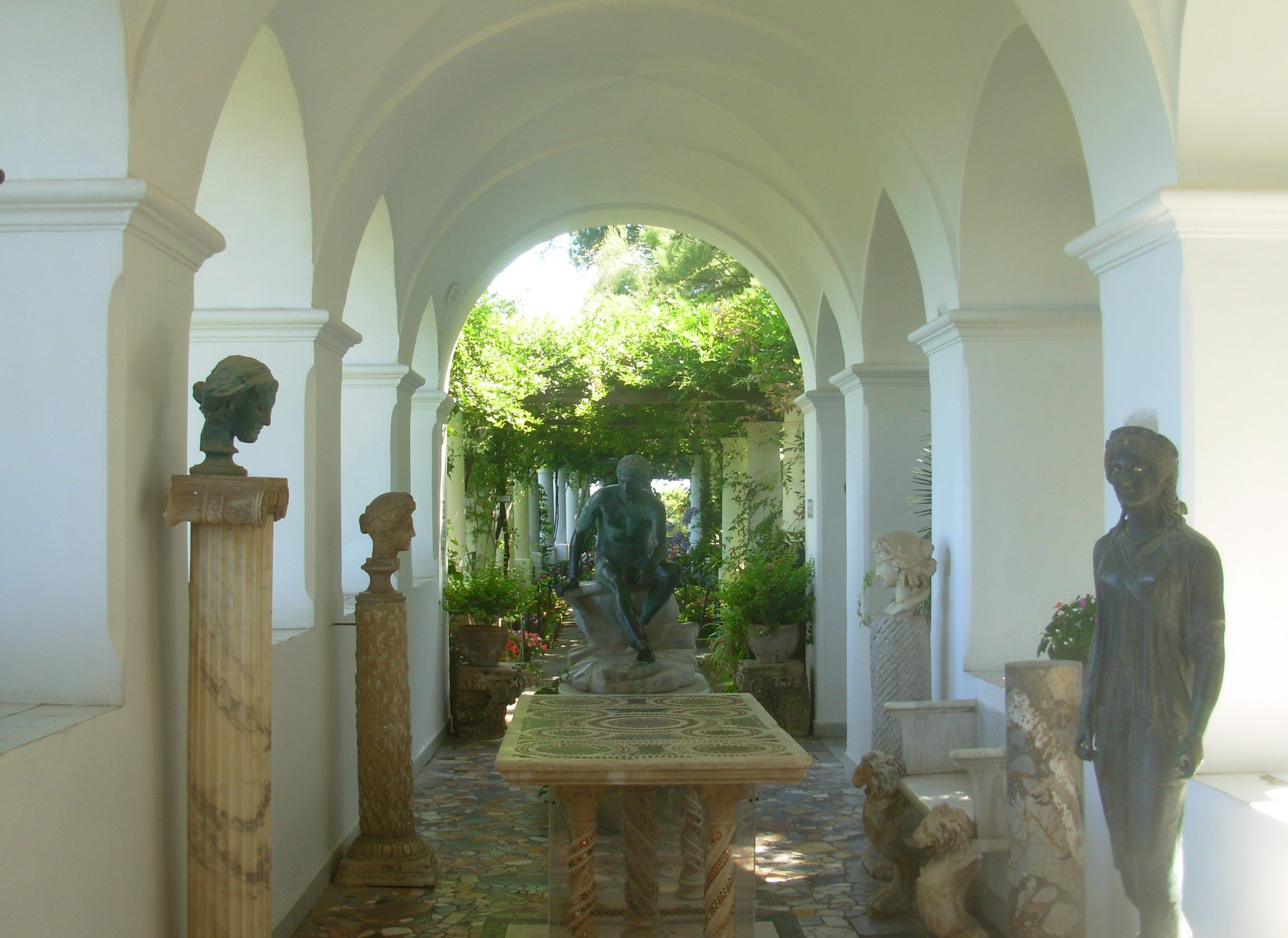 Villa San Michele in Anacapri